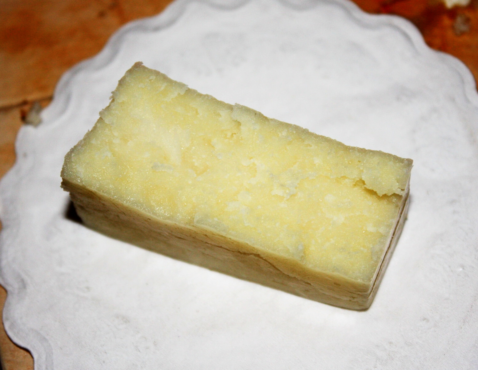 Kaschkawal, Kashkaval, кашкавал, Balkankäse, Sofia, Bulgaria